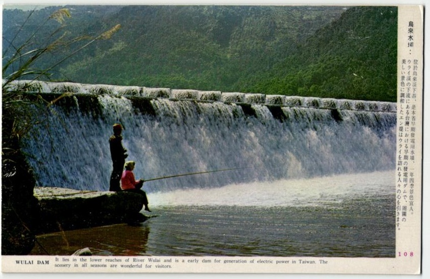 烏來水壩：位於烏來溪下游，是本省早期發電用水壩，一年四季景色宜人。